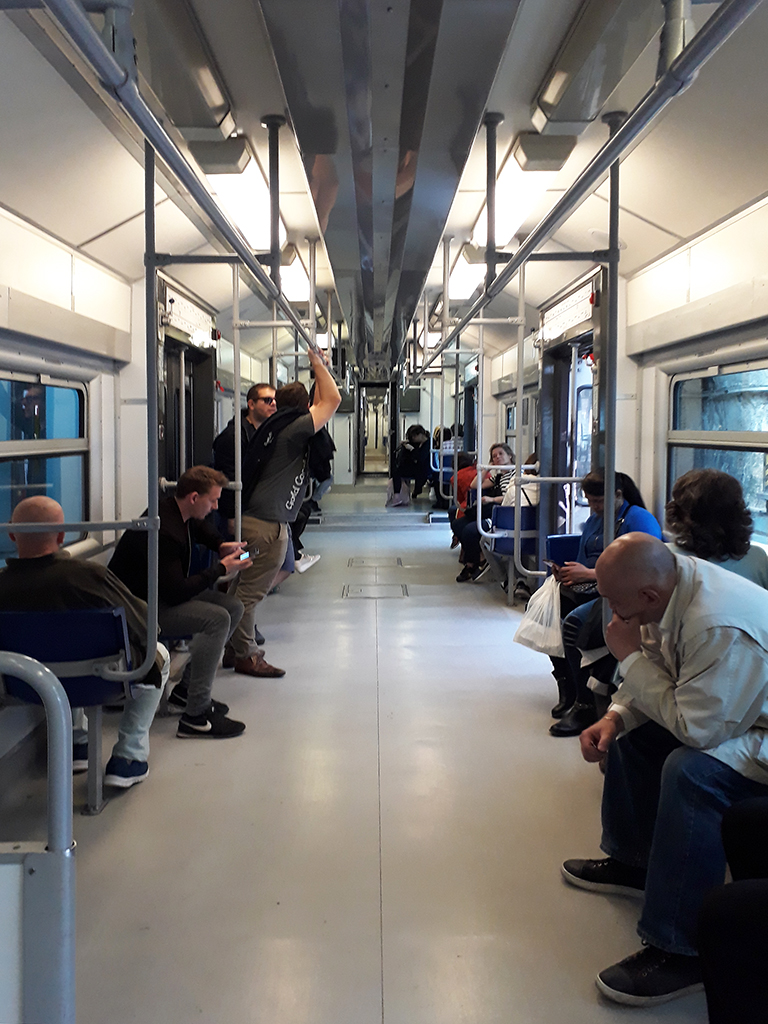 Napoli, interno di un elettrotreno serie ET.400, in servizio sulle ferrovie Cumana e Circumflegrea.